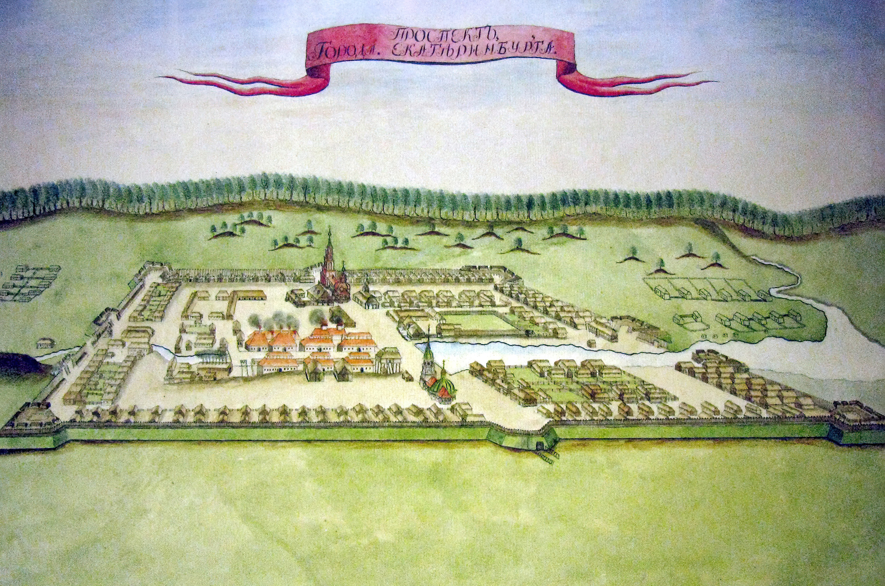 План Екатеринбурга